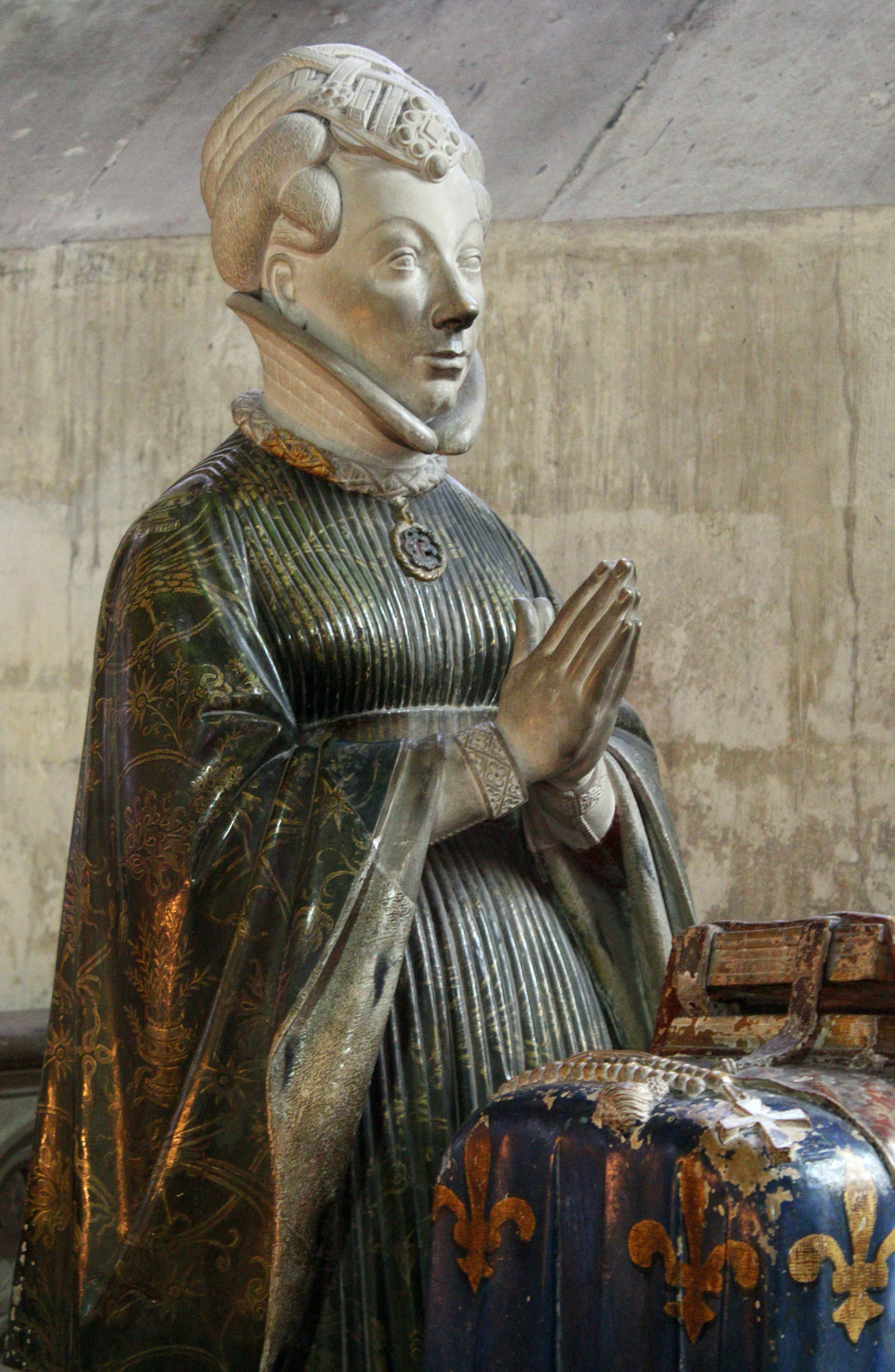 Cathédrale Saint-Étienne de Bourges. Priant de Jeanne de Boulogne dans l'abside